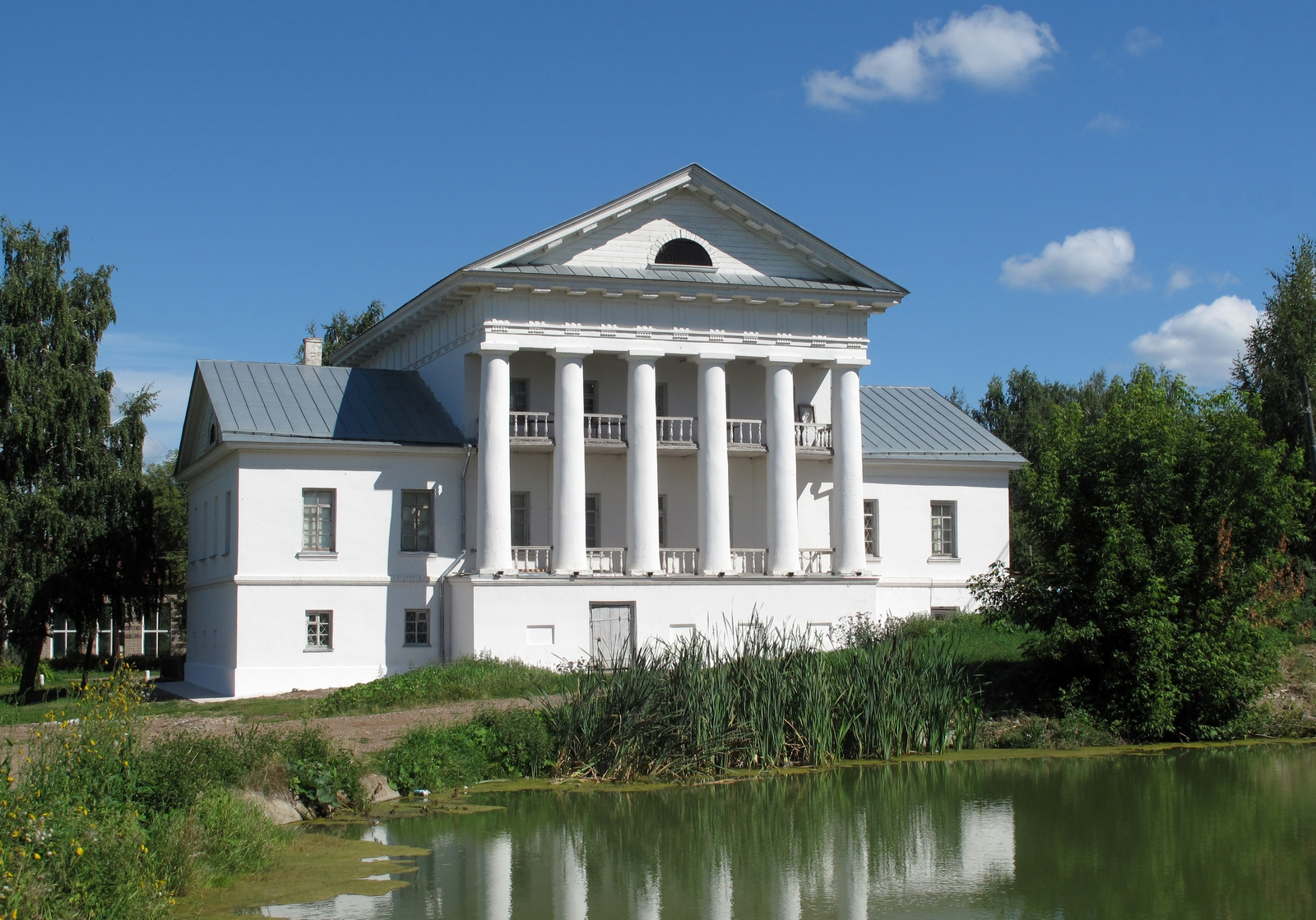 Здание правления пермскими имениями Строгановых в п. Ильинский. Сейчас в нем размещается краеведческий музей.